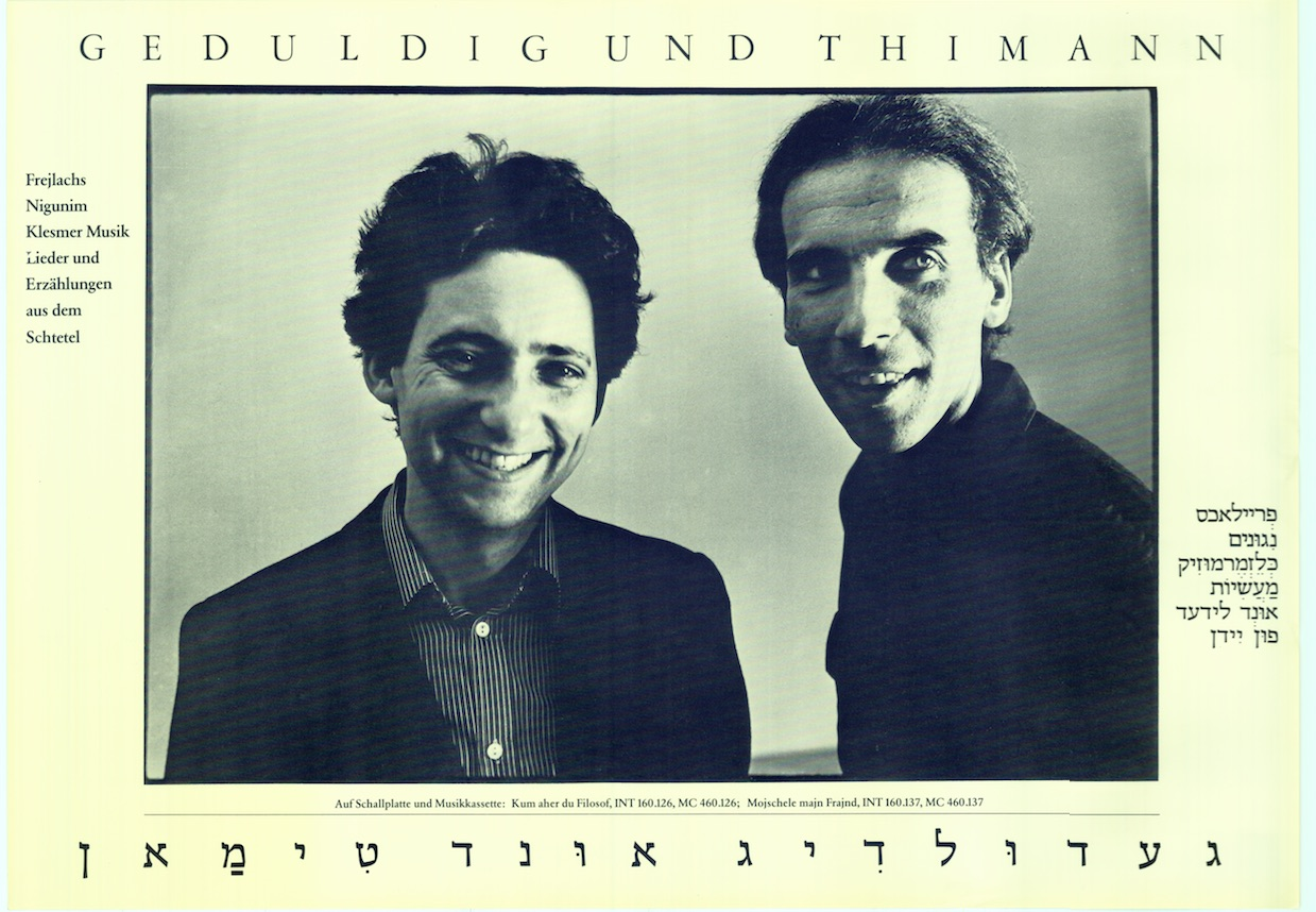 Albert Thimann und Edward Geduldig, Foto Elfi Semotan, Entwurf Jacky Merlicek